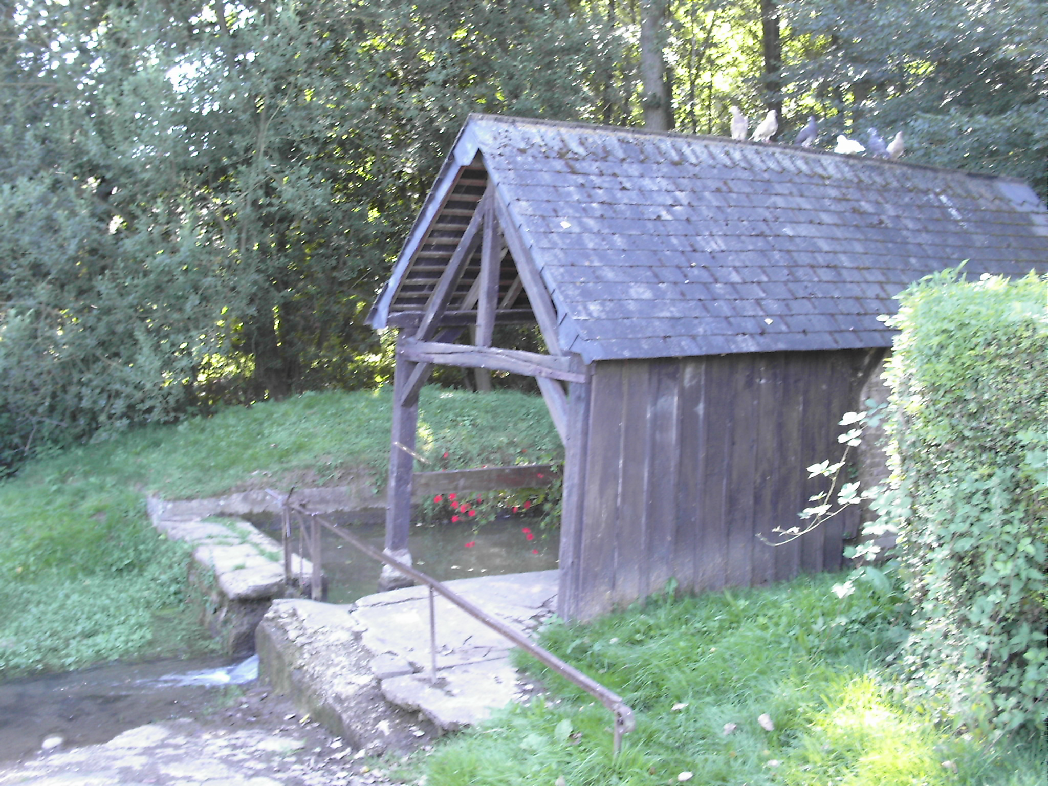 Le lavoir de Wambez se trouve au millieu de la commune (60380)